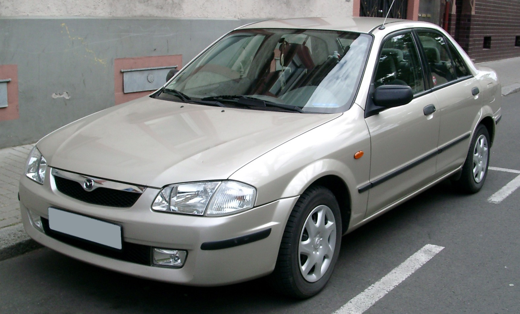 Mazda 323 BJ